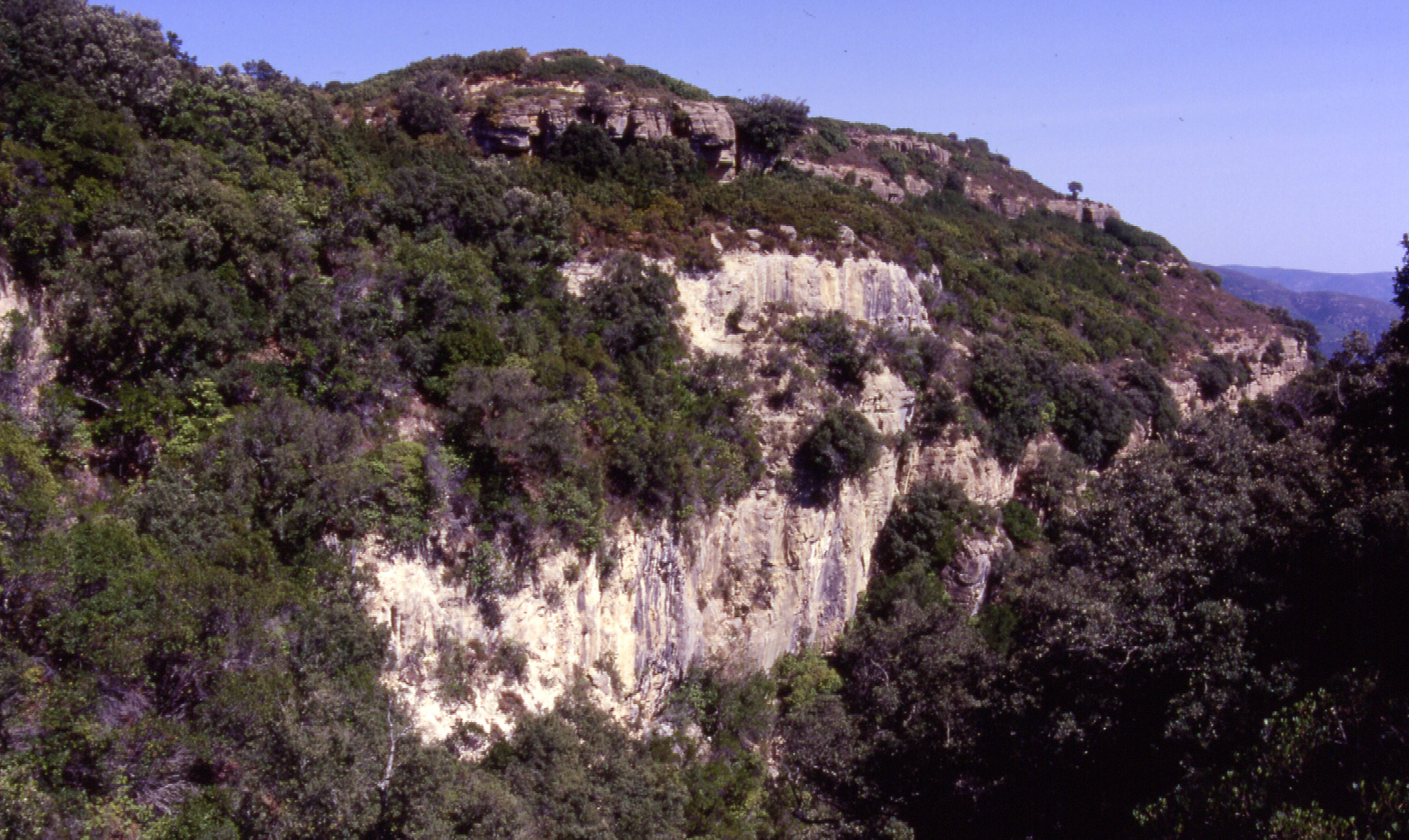 La gola di "Strumpu Costedda" all'interno del Poligono di Quirra. All'interno della gola si apre il "Ramo Serra" della grotta de "Is Angurtidorgius" (it. gli inghiottitoi), il principale sistema carsico, lungo circa 11 km, che si estende sotto il poligono militare.